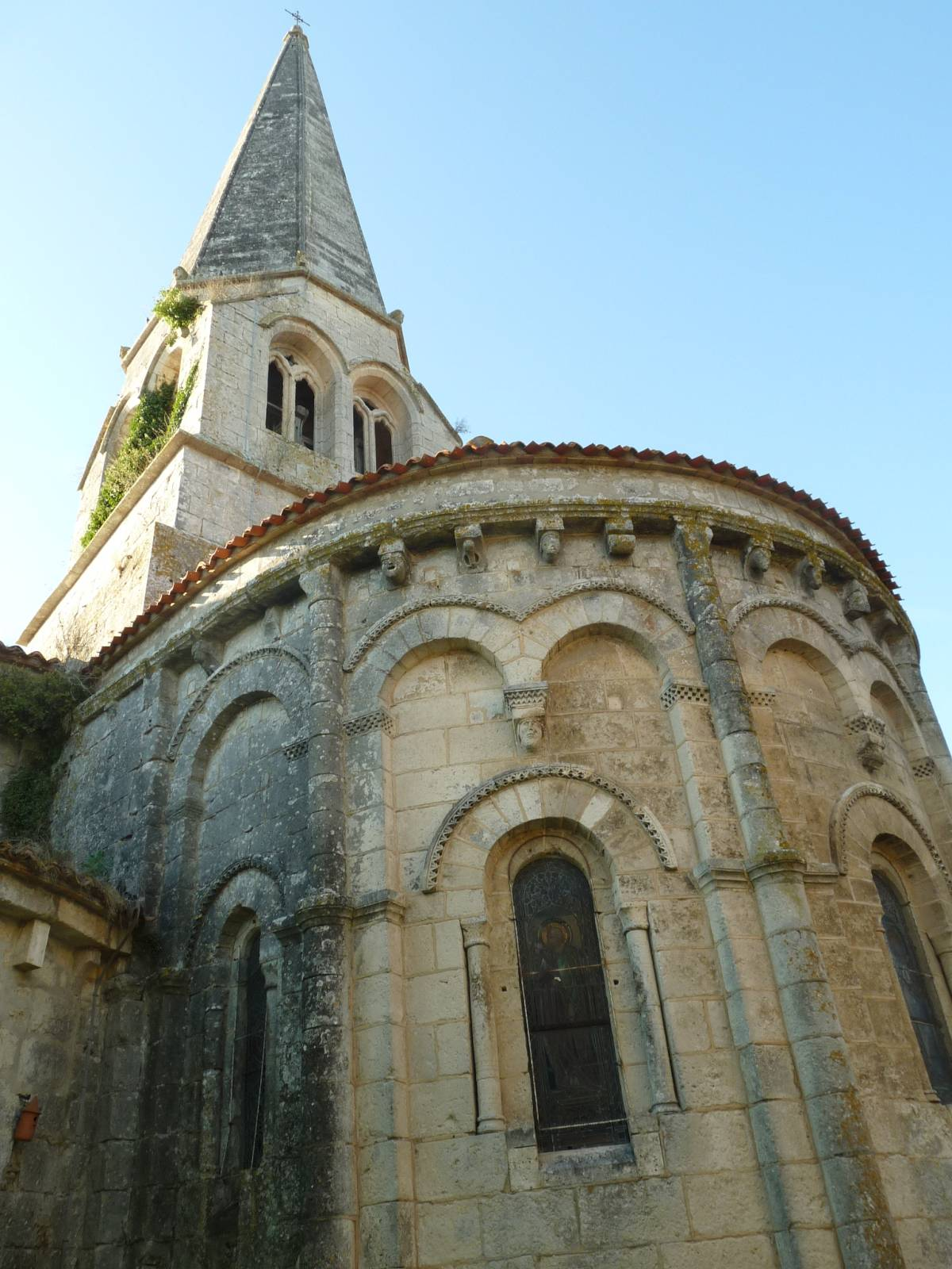 église de Charmant (16), France